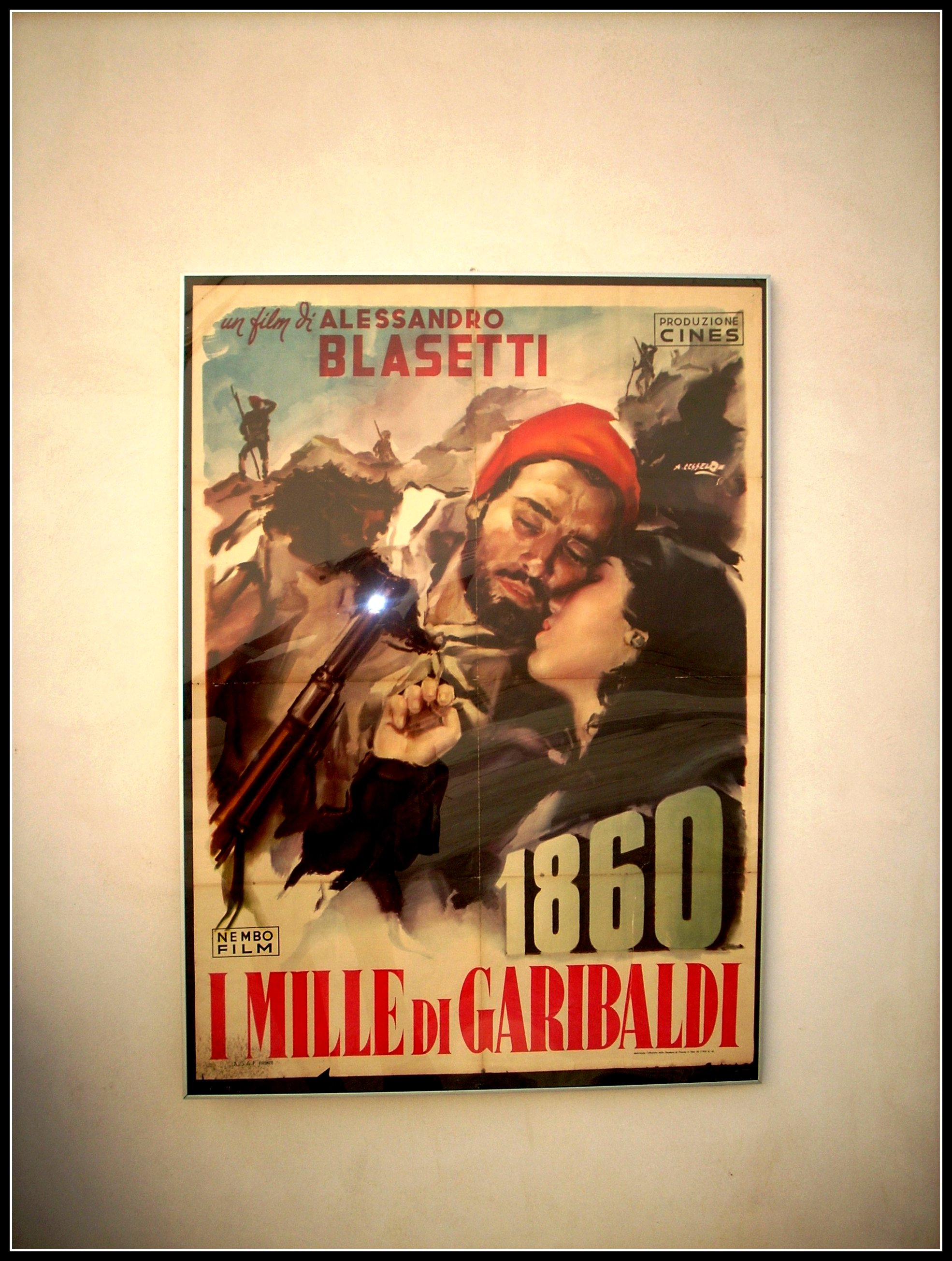 Sciacca: Rassegna cinematografica alla Badia Grande: "1860" di Blasetti